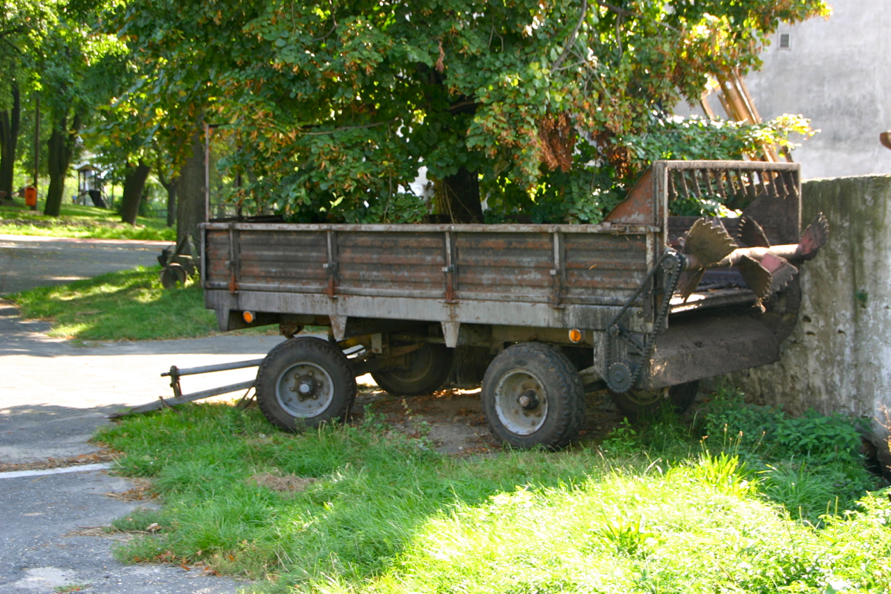 Miststreuer in Oleszka (deutsch Oleschka), einem Dorf in der polnischen Wojewodschaft Opole, Powiat Krapkowicki, Gemeinde Zdzieszowice.